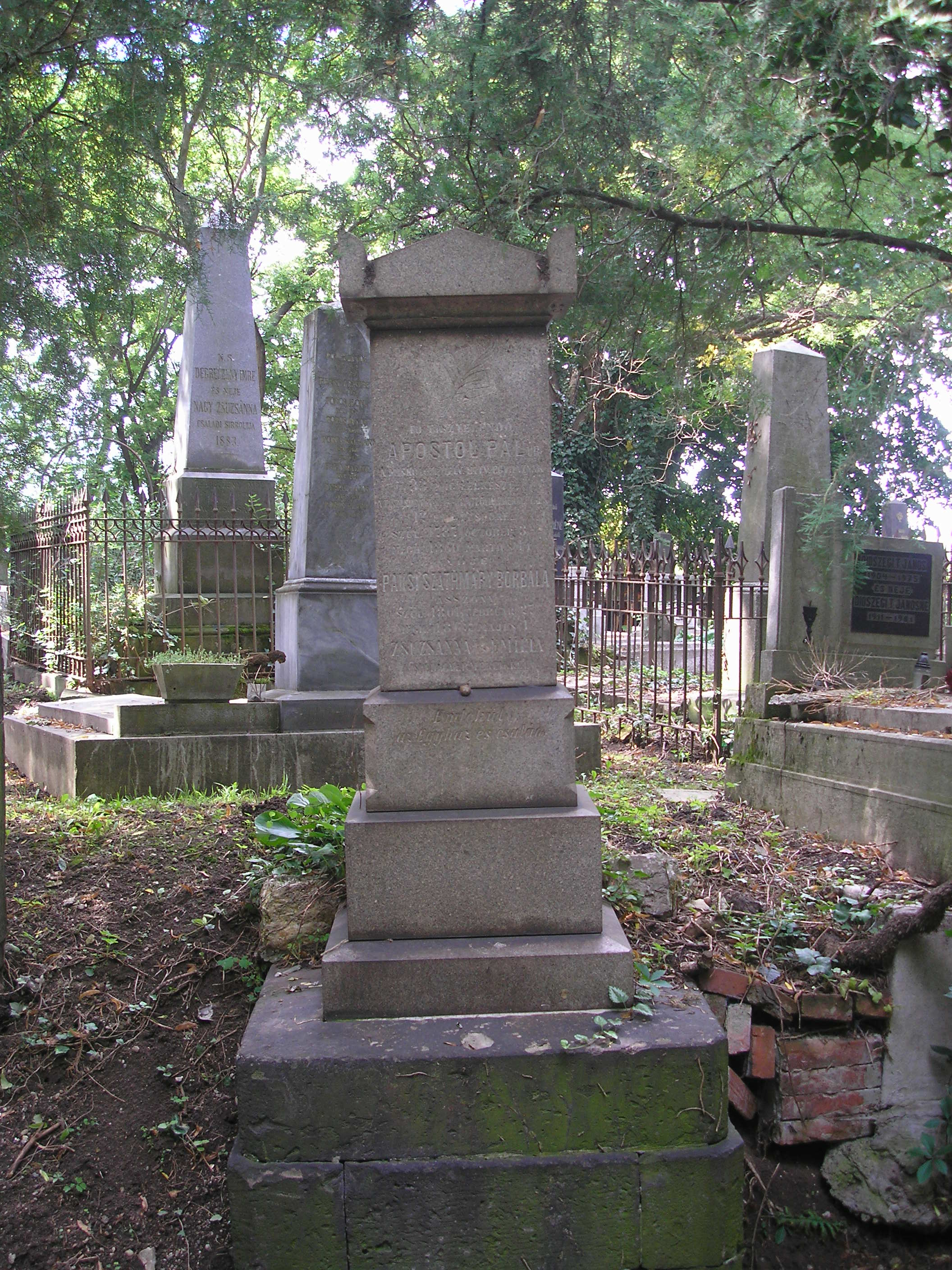 FŐ TISZTELENDŐ/APOSTOL PÁL ÚR/A MISKOLCZI HELV. HITV. EGYHÁZNAK 33 ÉVIG LELKÉSZE/A TISZÁNINNENI HELV. HITV. EGYHÁZKERÜLETNEK/12 ÉVIG PÜSPÖKE/SZÜL. 1787. OCTOBER 3-ÁN/MEGH. 1860. MARTIUS 14-ÉN //NŐJE//PAKSI SZATHMÁRY BORBÁLA ASSZONY/ SZÜL. 1801. FEBRUAR 27-ÉN/MEGH. 1863. MÁJUS 1-ÉN/ZSUZSANNA ÉS EMÍLIA/KISDED GYERMEKEIKKEL //EMLÉKÜL AZ EGYHÁZ ÉS CSALÁD (Miskolc, Avasi temető)